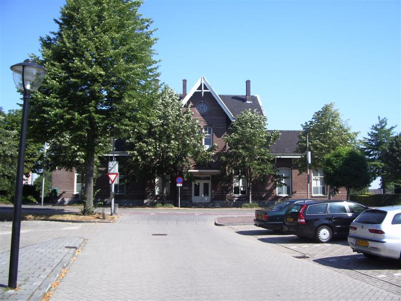 Het niet meer in gebruik zijnde stationsgebouw te Leerdam.